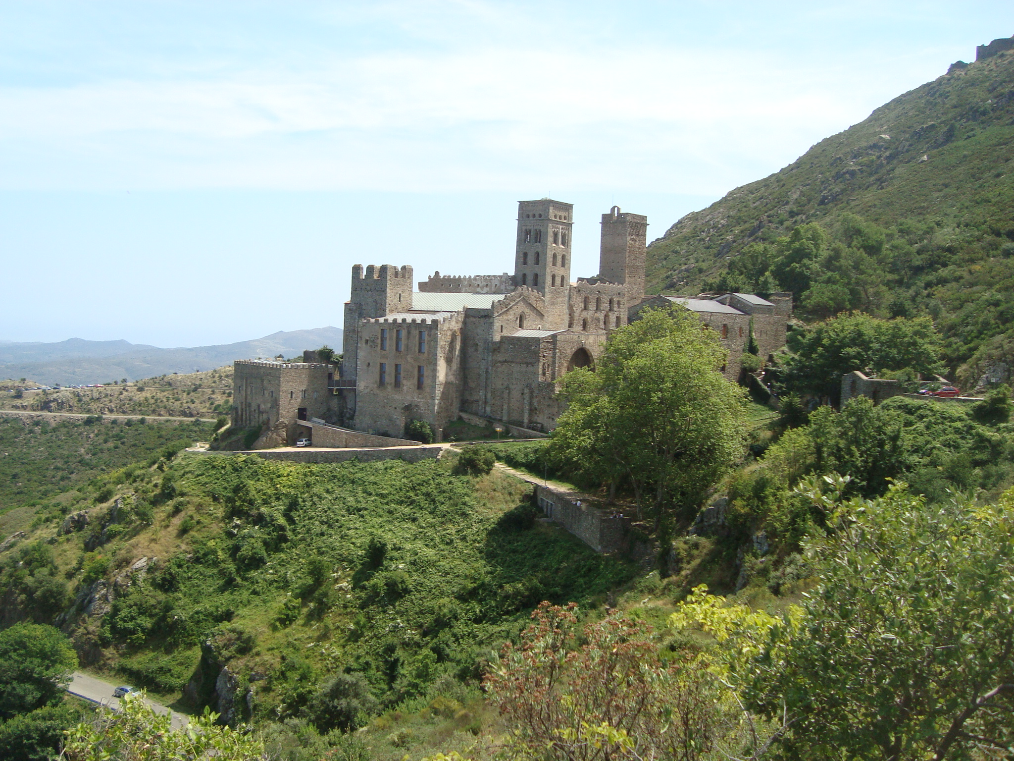 Monestir de Sant Pere de Rodes